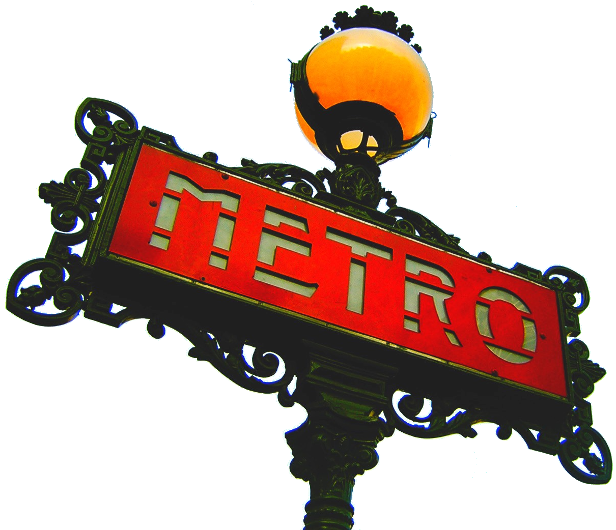 Paris Metro Sign